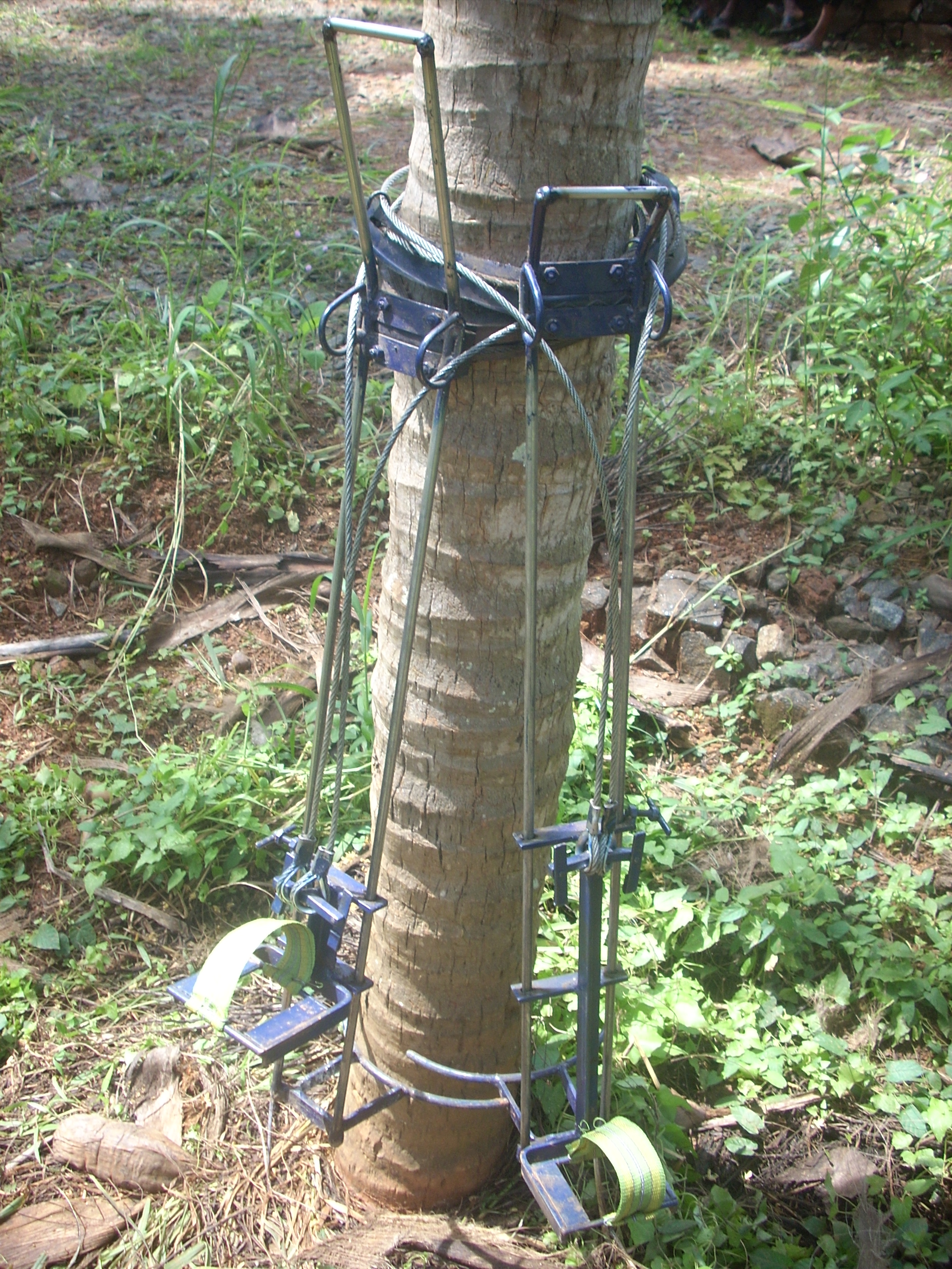 തെങ്ങുകയറ്റയന്ത്രം